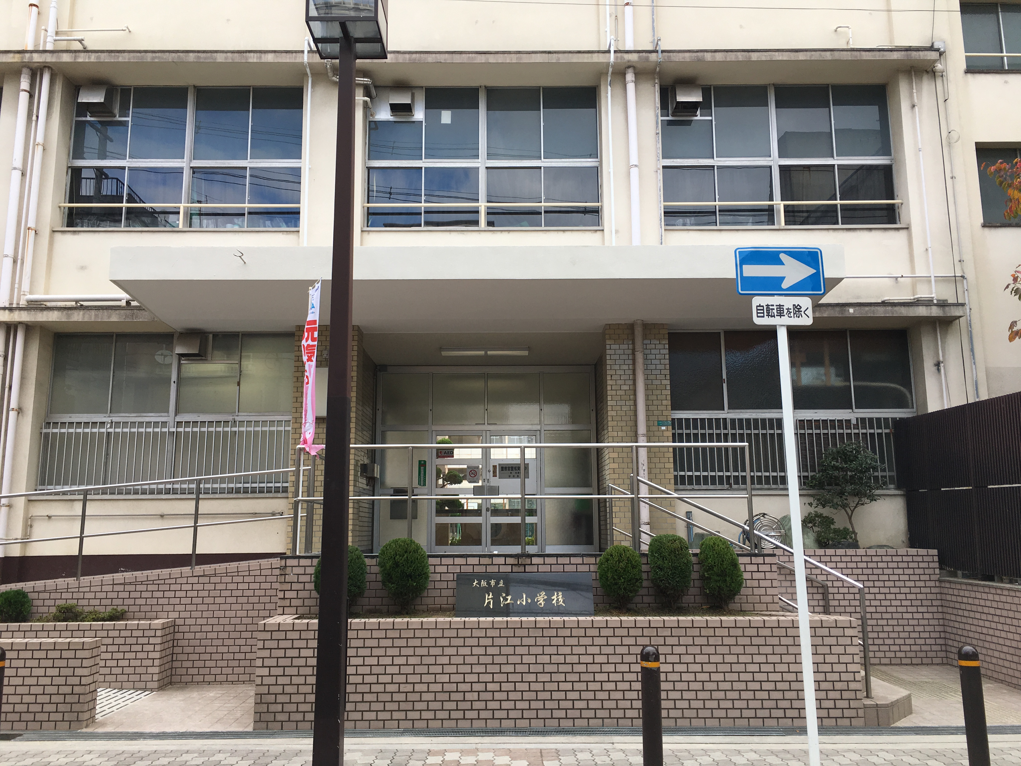 大阪市立片江小学校